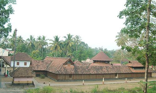 പടിഞ്ഞാറ്റിൻകര ശിവക്ഷേത്രം